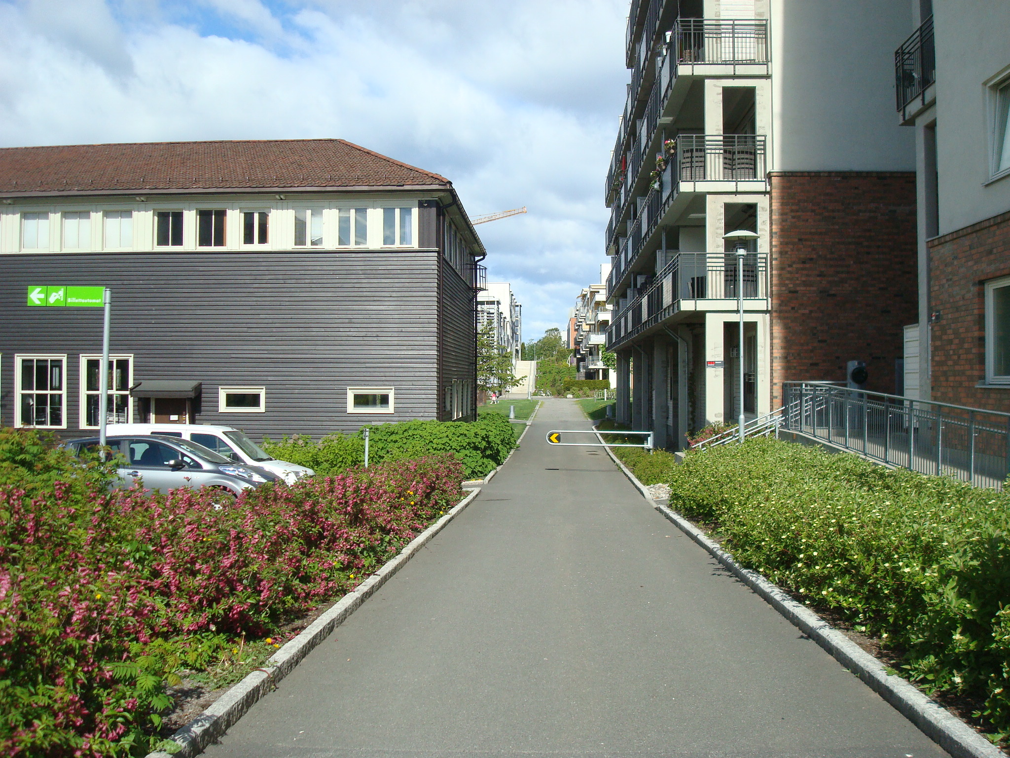 Normaveien i Oslo. Sett mot Lørenparken, Kanonhallen til venstre i bildet.